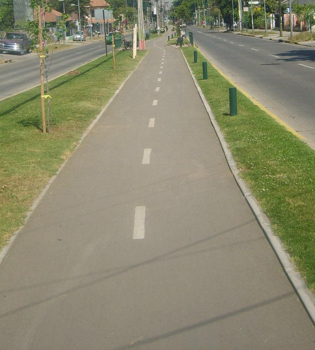 Ciclovia en La Reina, Chile